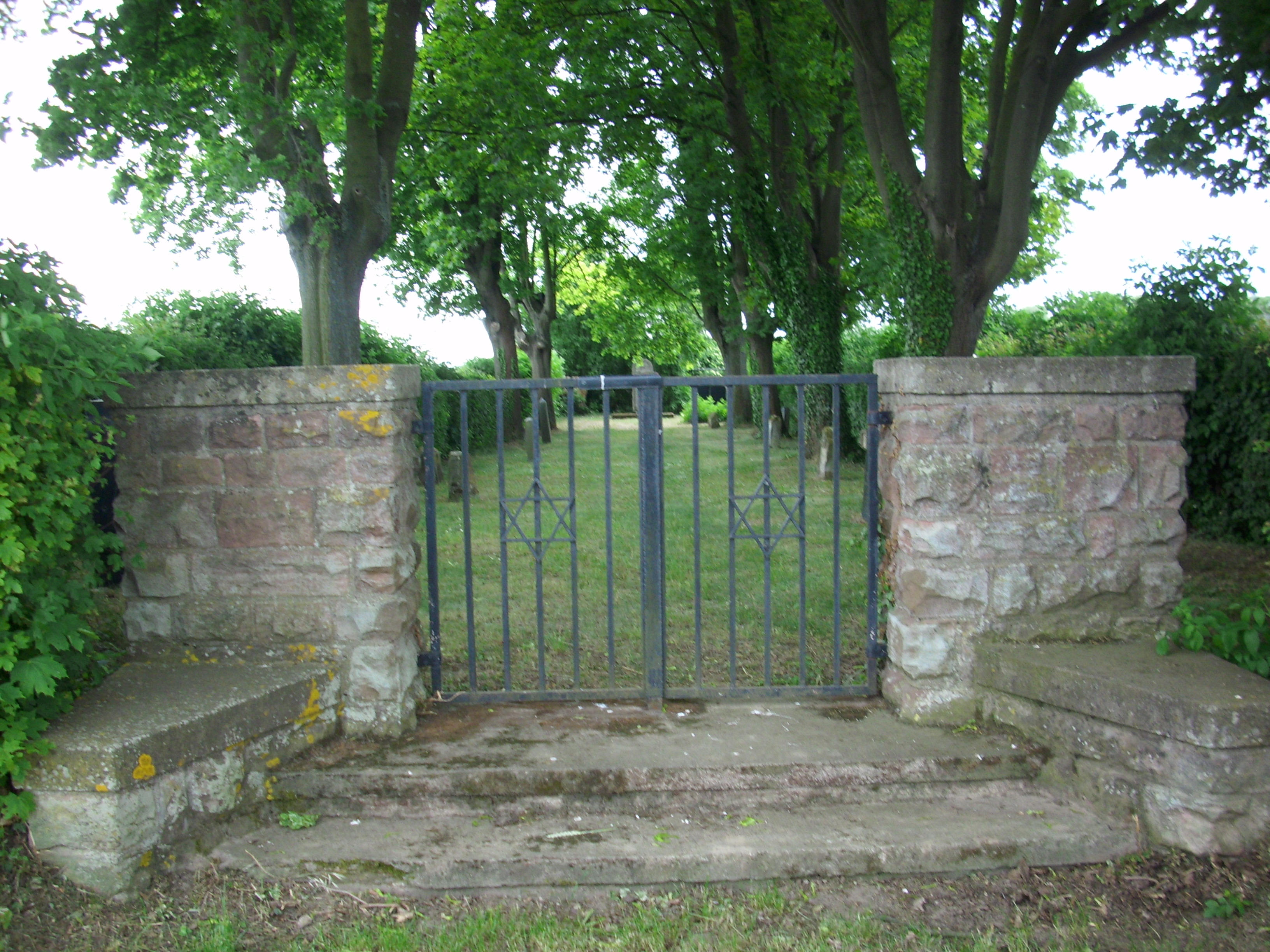 Um 1884 angelegtes, bis 1938 belegtes langgezogenes Areal; 16 Grabmäler bzw. -fragmente von 1870 bis 1922; Holocaust-Gedenkstein, 1948